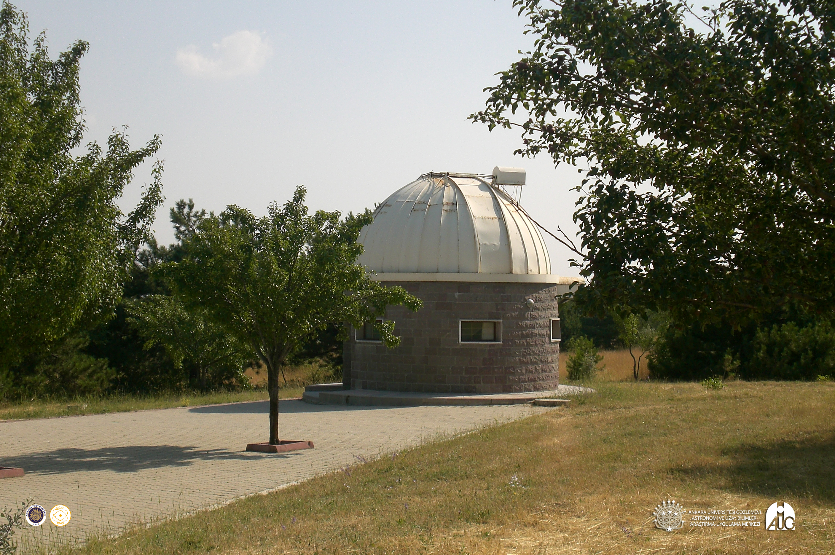 Coude Teleskop Binası